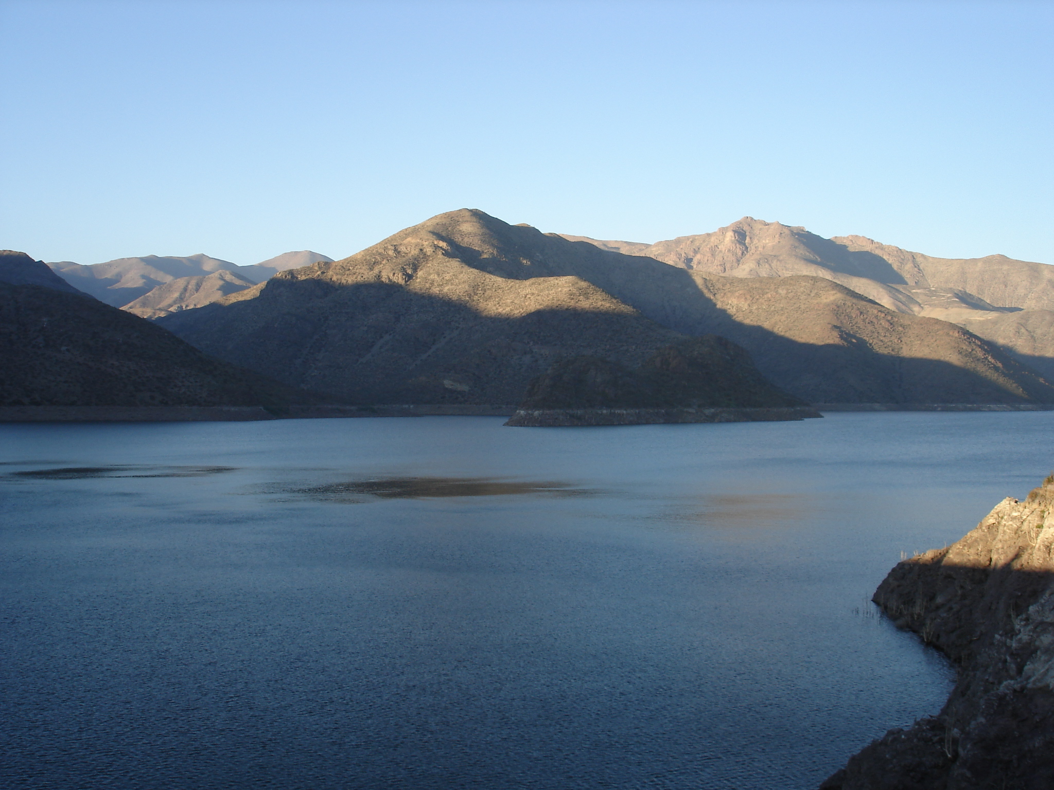 DSC01190 - Embalse Puclaro